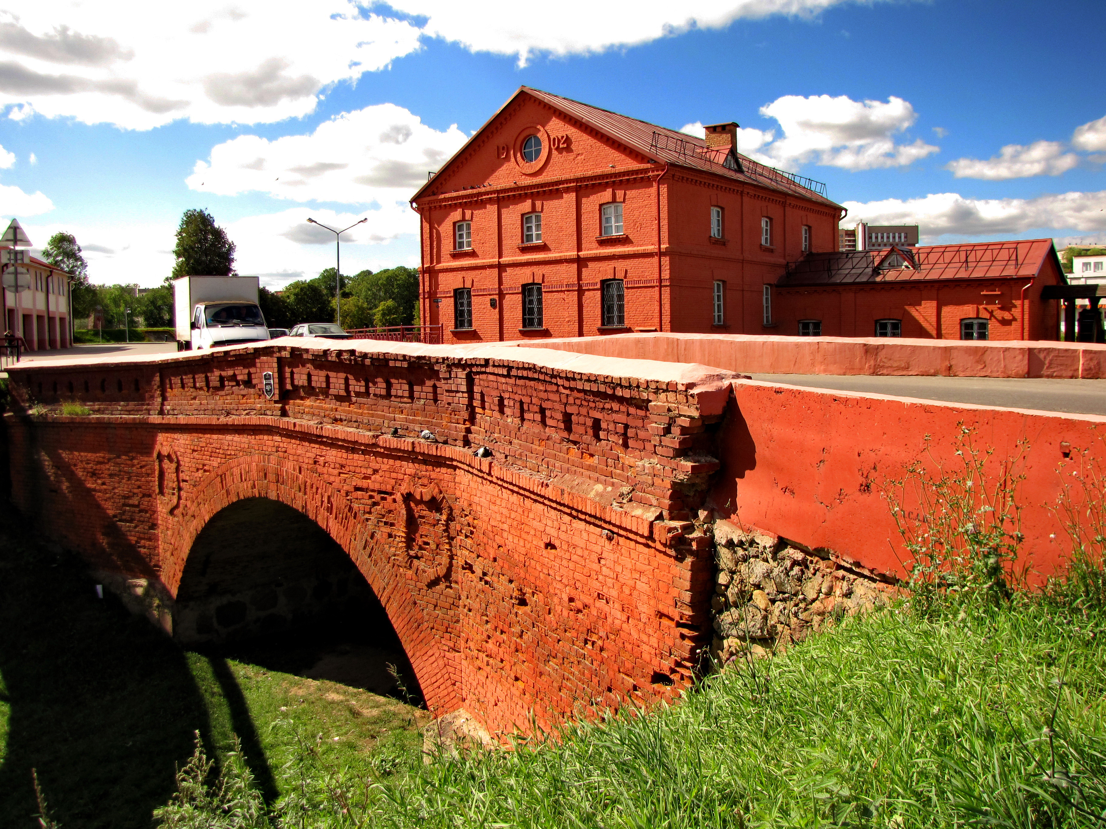 Беларуская (тарашкевіца): Будынак былога вадзянога млына. г. Ворша This is a photo of Belarusian heritage monument. Reference number: 212Г000109 ( WLM)